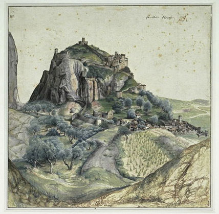 Aquarelle et gouache sur parchemin, 22,3 x 22,2 cm peinte au retour du voyage de Vérone à Trente inscription en haut à droite, à la plume et encre brune annoté par Dürer : Fenedier Klawsen : col vénitien par une autre main à la plume, à l'encre brune, le monogramme de l'artiste et peut-être plus tard par Dürer qui ne se rappelait plus le nom du lieu. Modification des teintes d'après un fichier du louvre